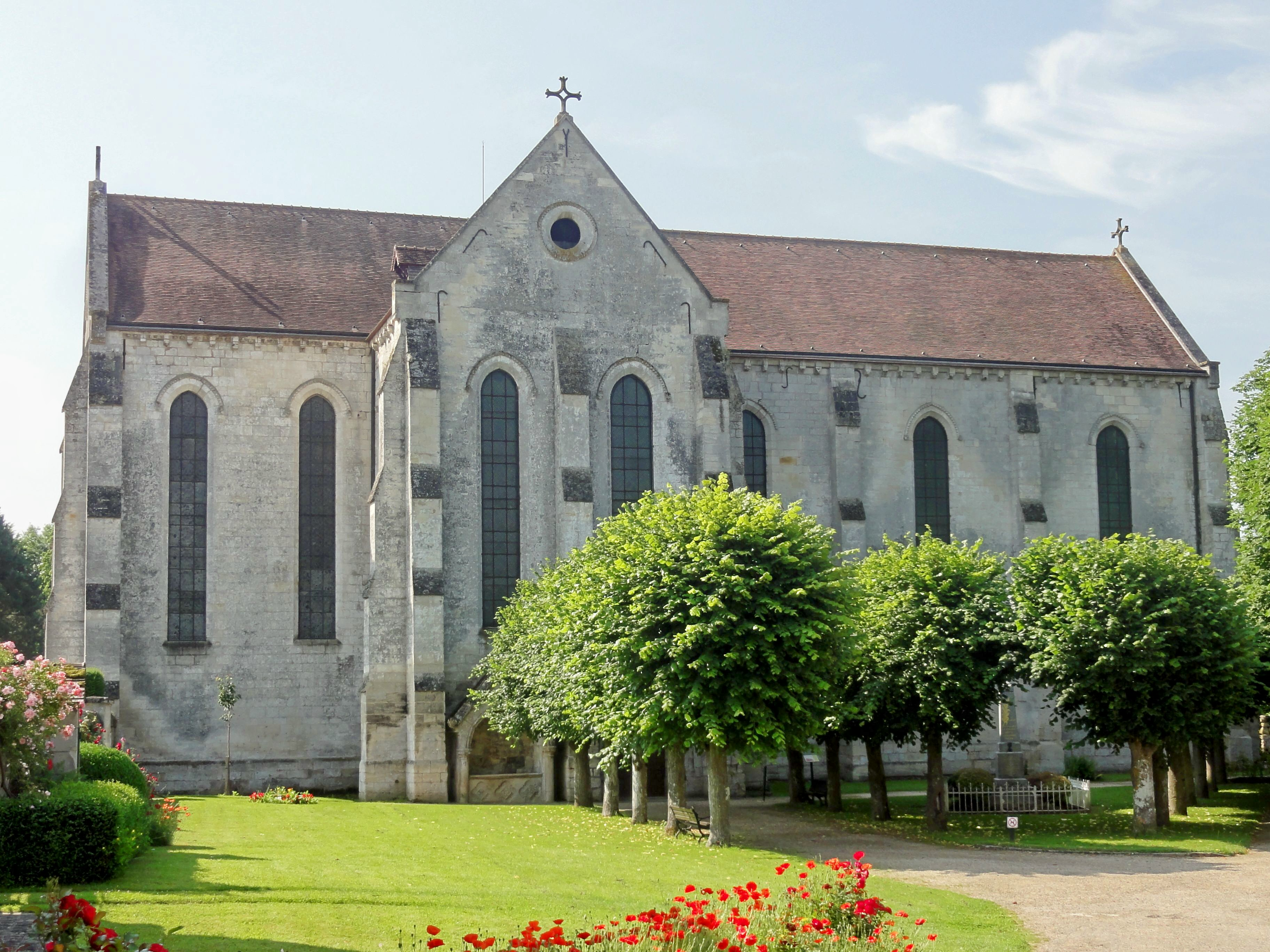 Vue de l'église depuis le nord.